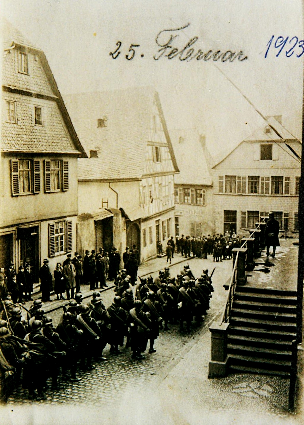 Besetzung des Marktplatzes von Lorch durch marokkanische Hilfstruppen der Franzosen am Sonntag dem 25. 02. 1923, das vorläufiges Ende des sogenannten Freistaates Flaschenhals